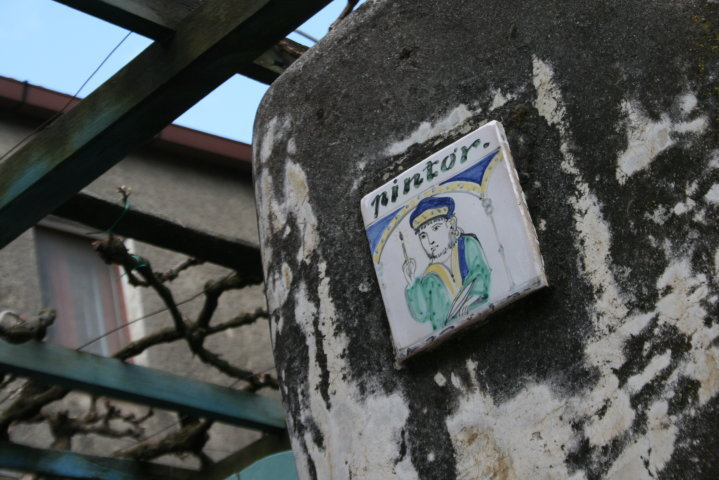 Entrata di casa Ortga